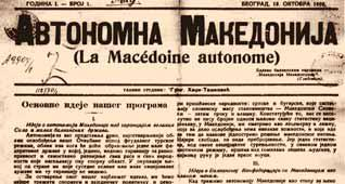 Брой на вестник "Автономна Македония"